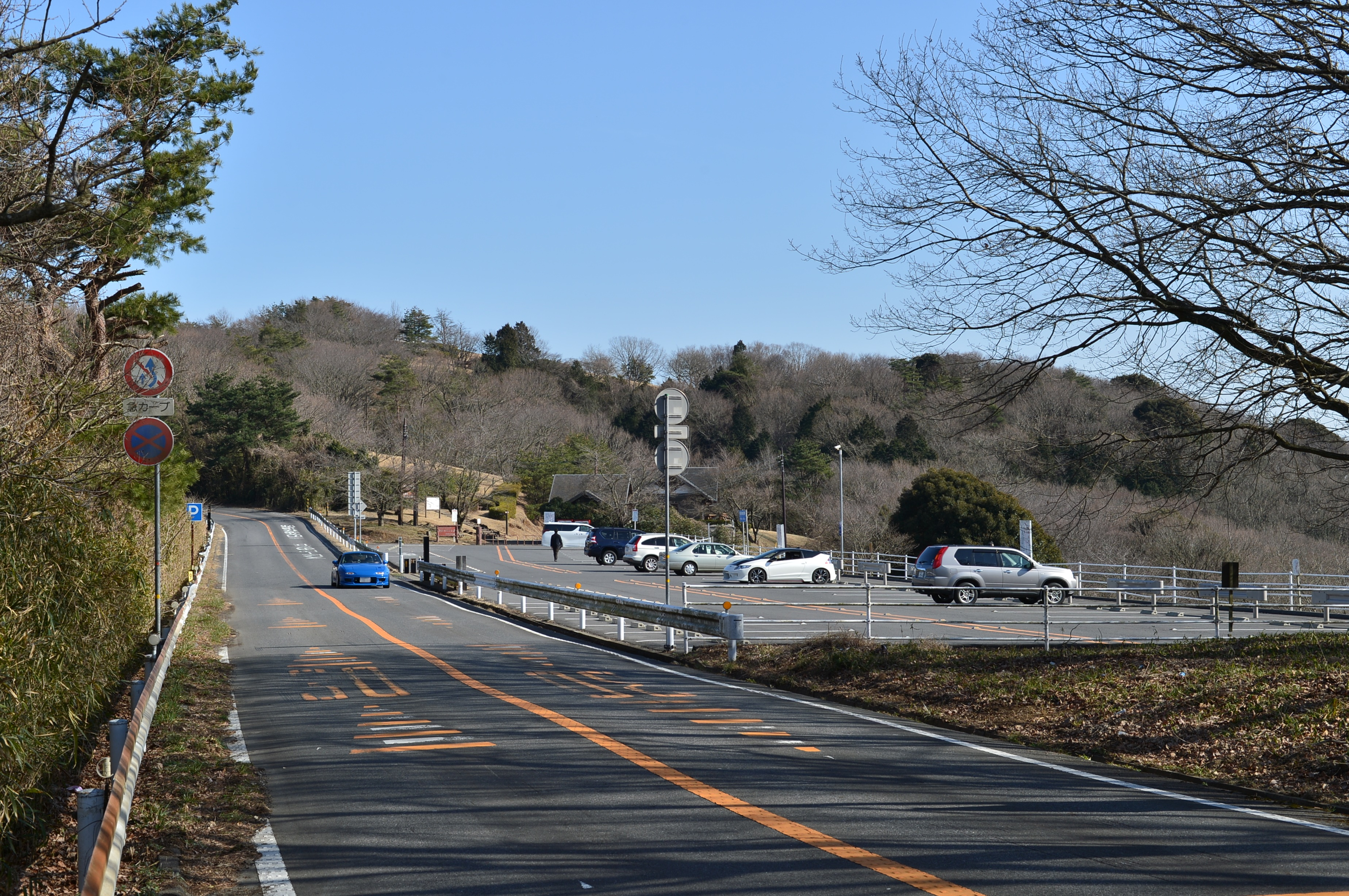 朝日峠駐車場（茨城県道236号筑波公園永井線）